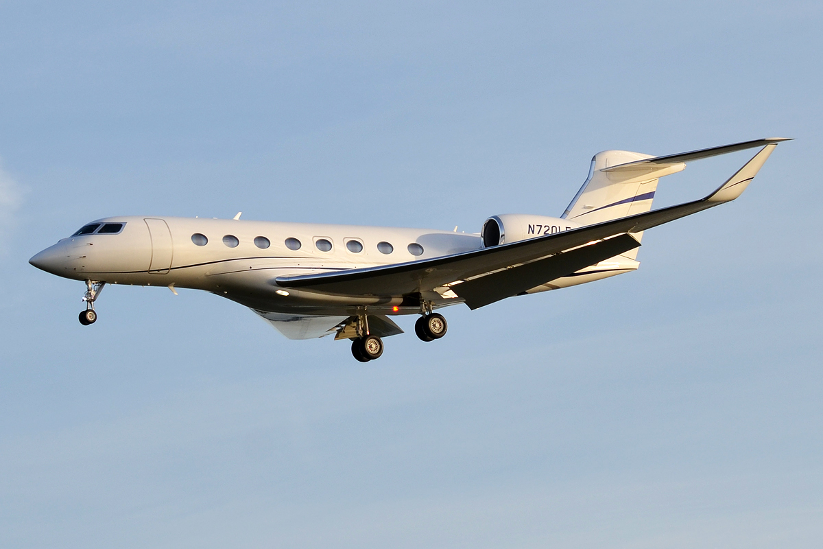 Private, N720LF, Gulfstream G650